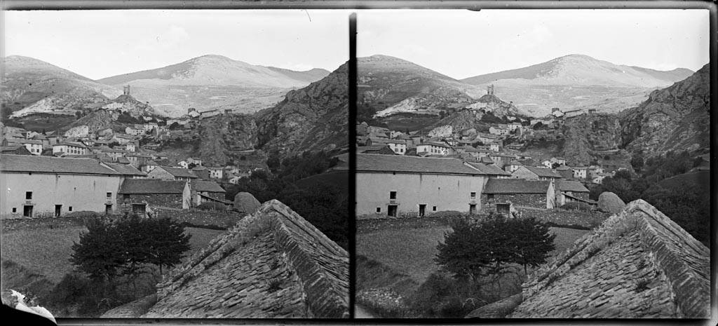 Comuna de Llo na primavera.